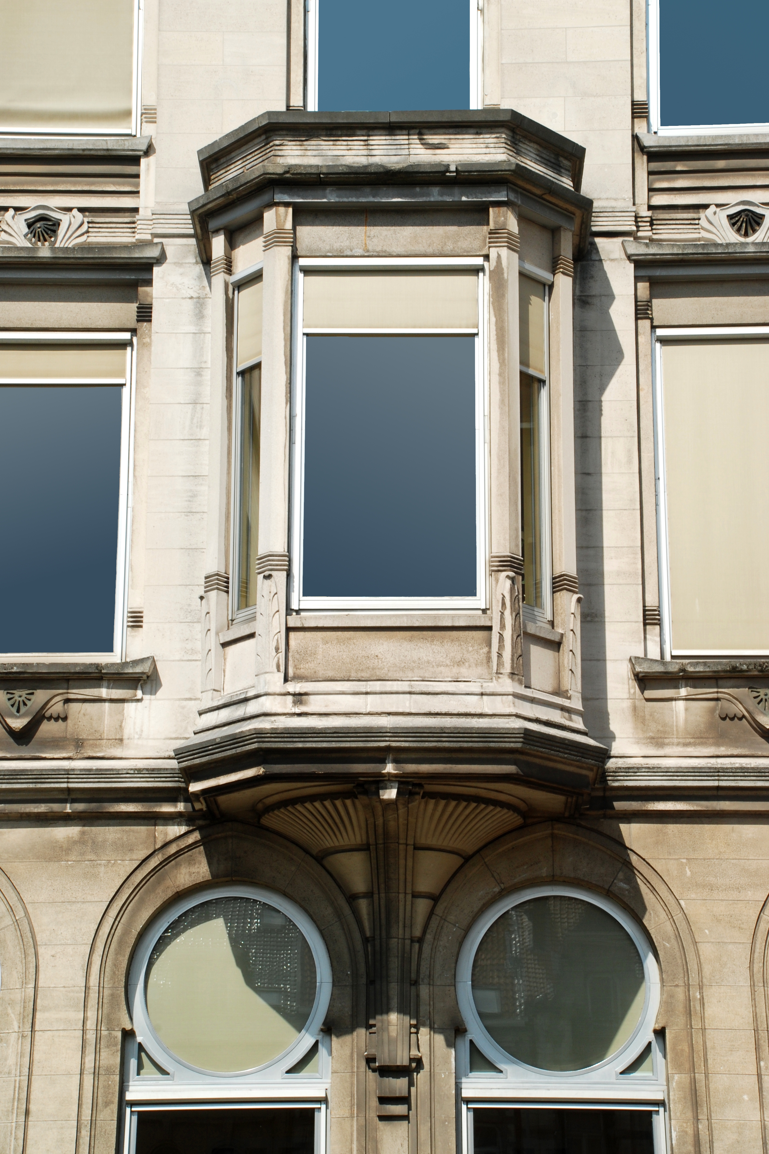 Belgique - Bruxelles - Hôtel Defize